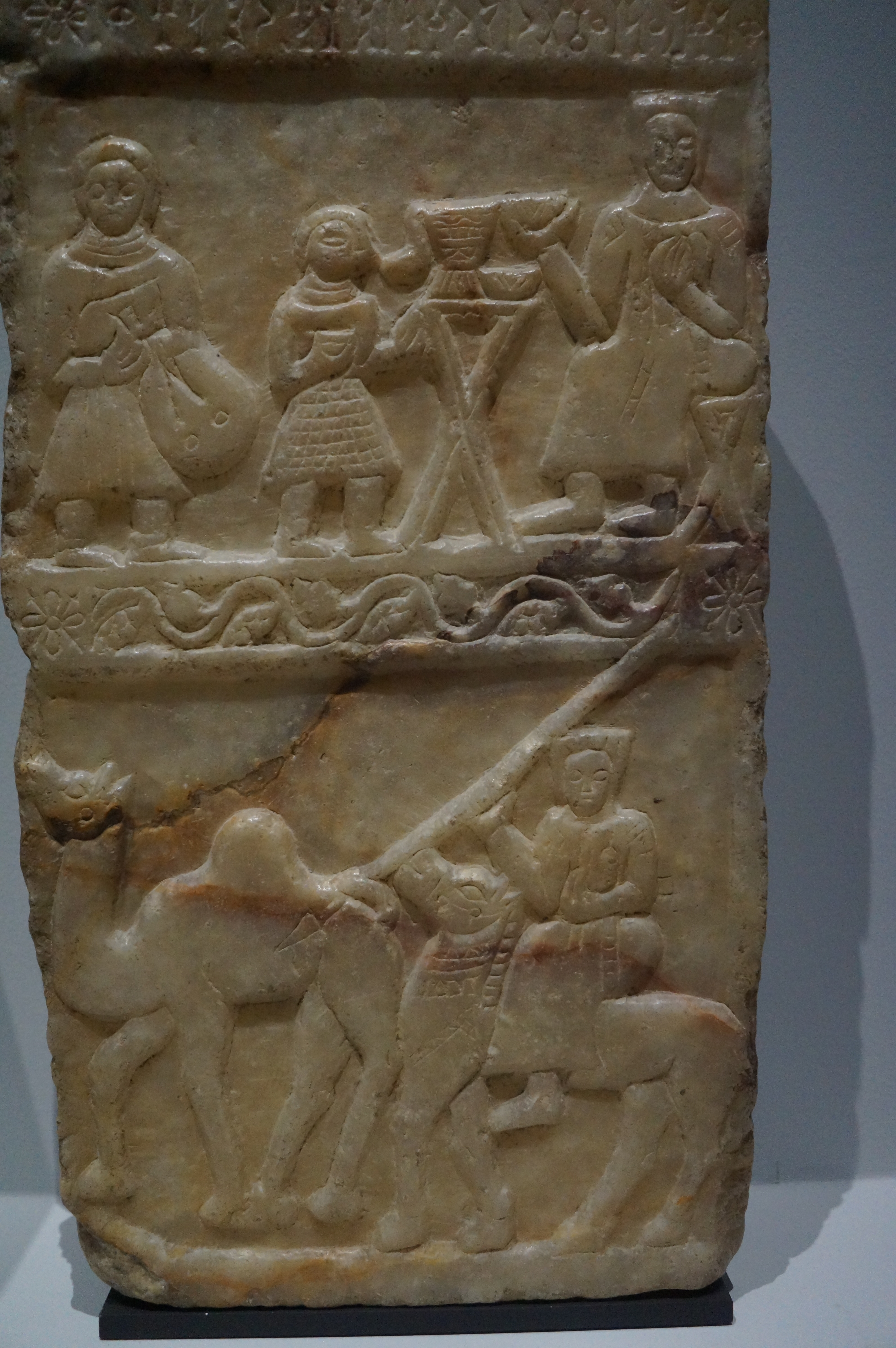 Stèle funéraire; bande supérieure: scène de banquet avec trois personnes; bande inférieure: conducteur de chameau avec deux chameaux. Inscription sabéenne: "Image et monument funéraire de` Iglum, fils de Sa`adīllāt de Qaryot. Que l'Orient «Athtar frappe quiconque le détruira». Albâtre, 1er-3ème siècles après JC. De l'Arabie du Sud.- H. 55 cm (21 ½ in.), W. 29 cm (11 ¼ in.), D. 8 cm (3 in.). Musée Louvre-Lens à Lens, Pas-de-Calais, Hauts-de-France,France.